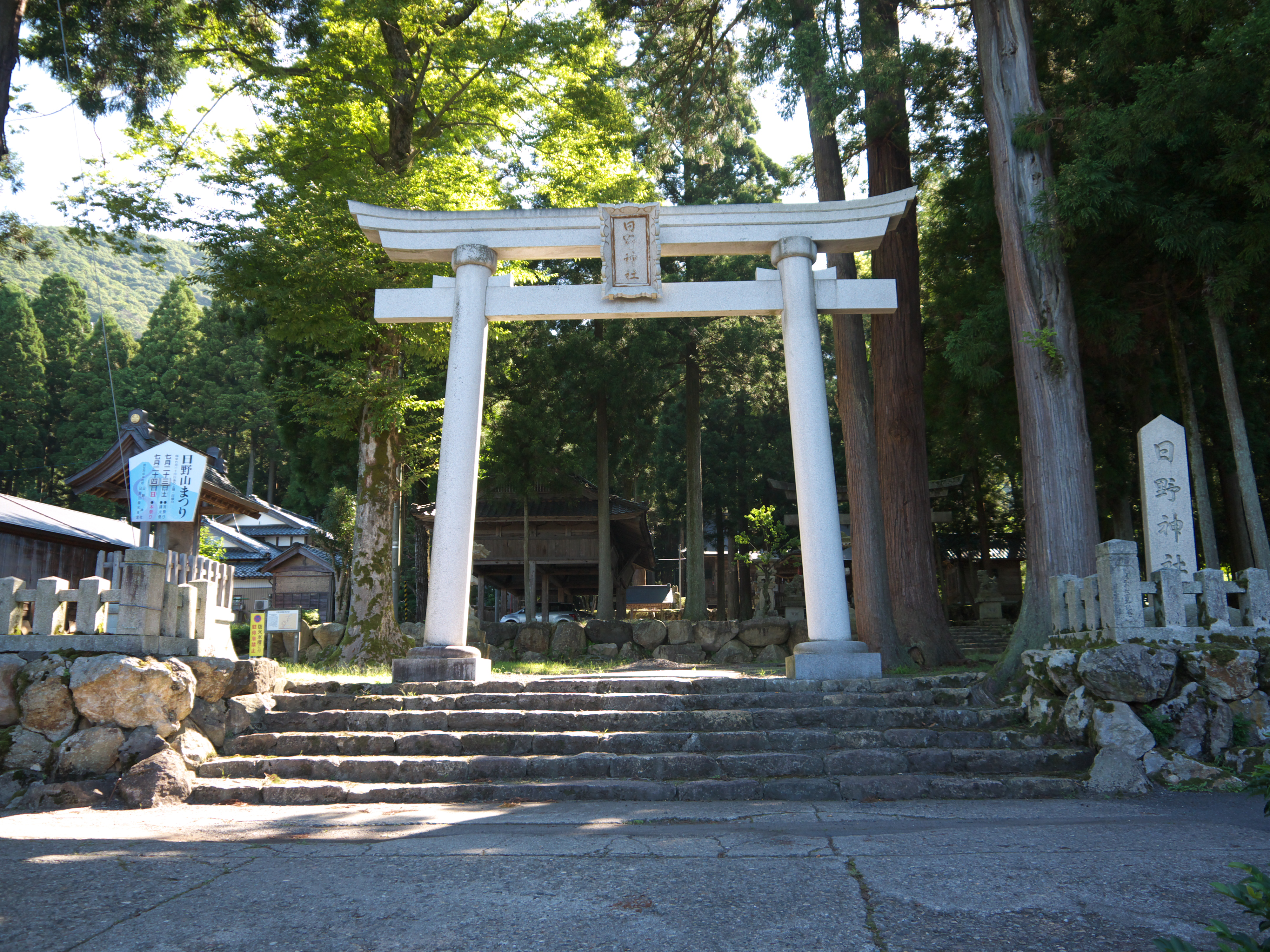 福井県越前市日野神社鳥居